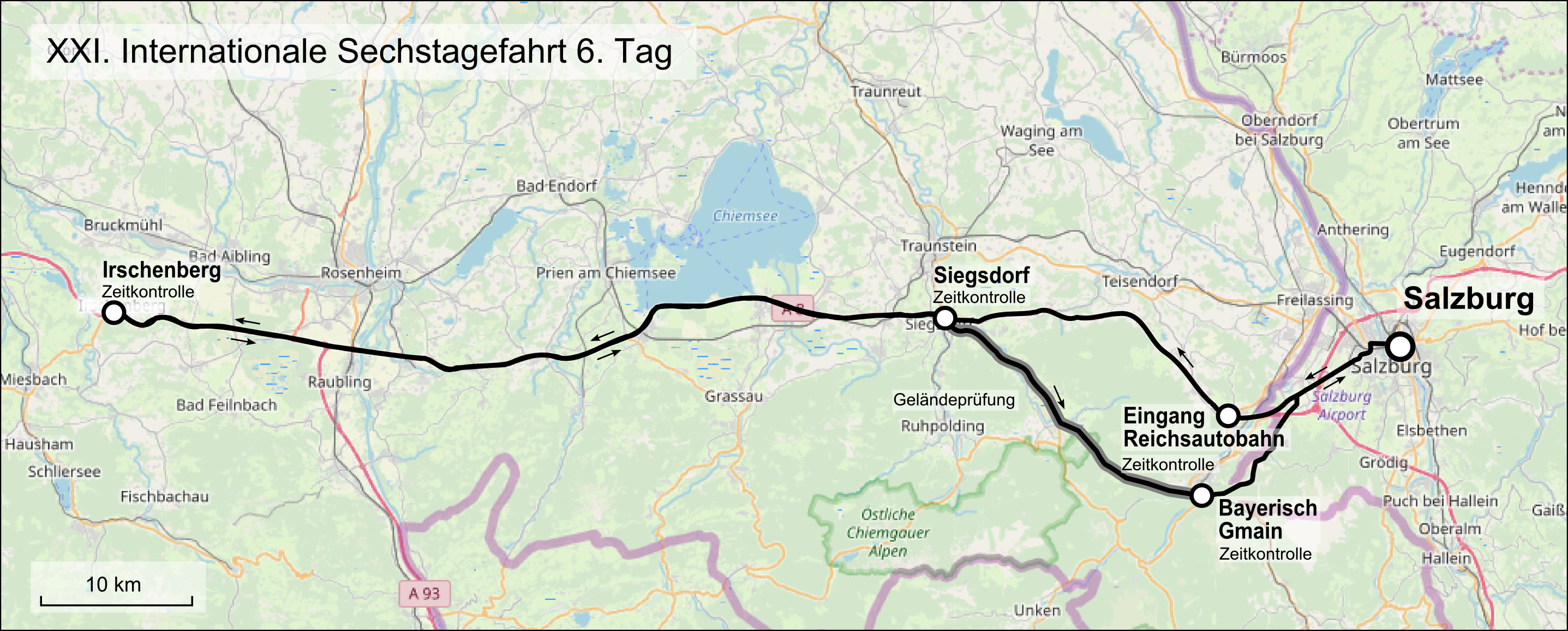 Karte der 21. Internationale Sechstagefahrt, Route des 6. Tages